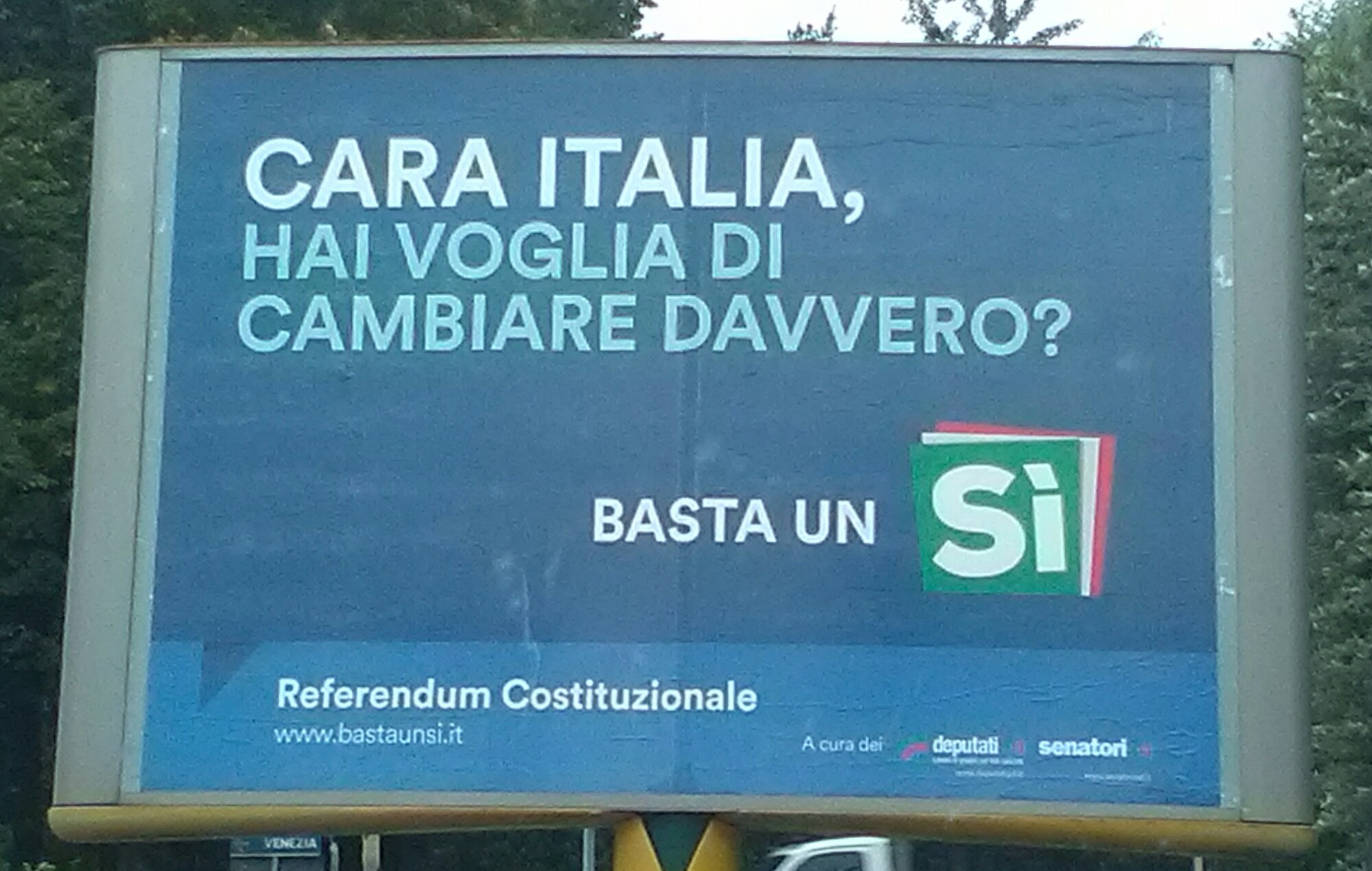 Pubblicità dei gruppi parlamentari del Partito Democratico prima dell'apertura della campagna elettorale ("Cara Italia, hai voglia di cambiare davvero?")